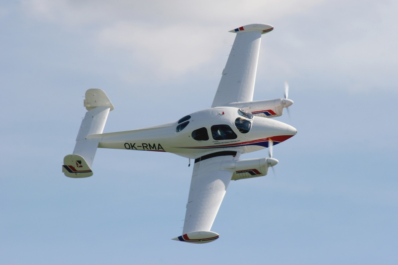 Letoun L-200D Morava při vyhlídkovém letu. Více na